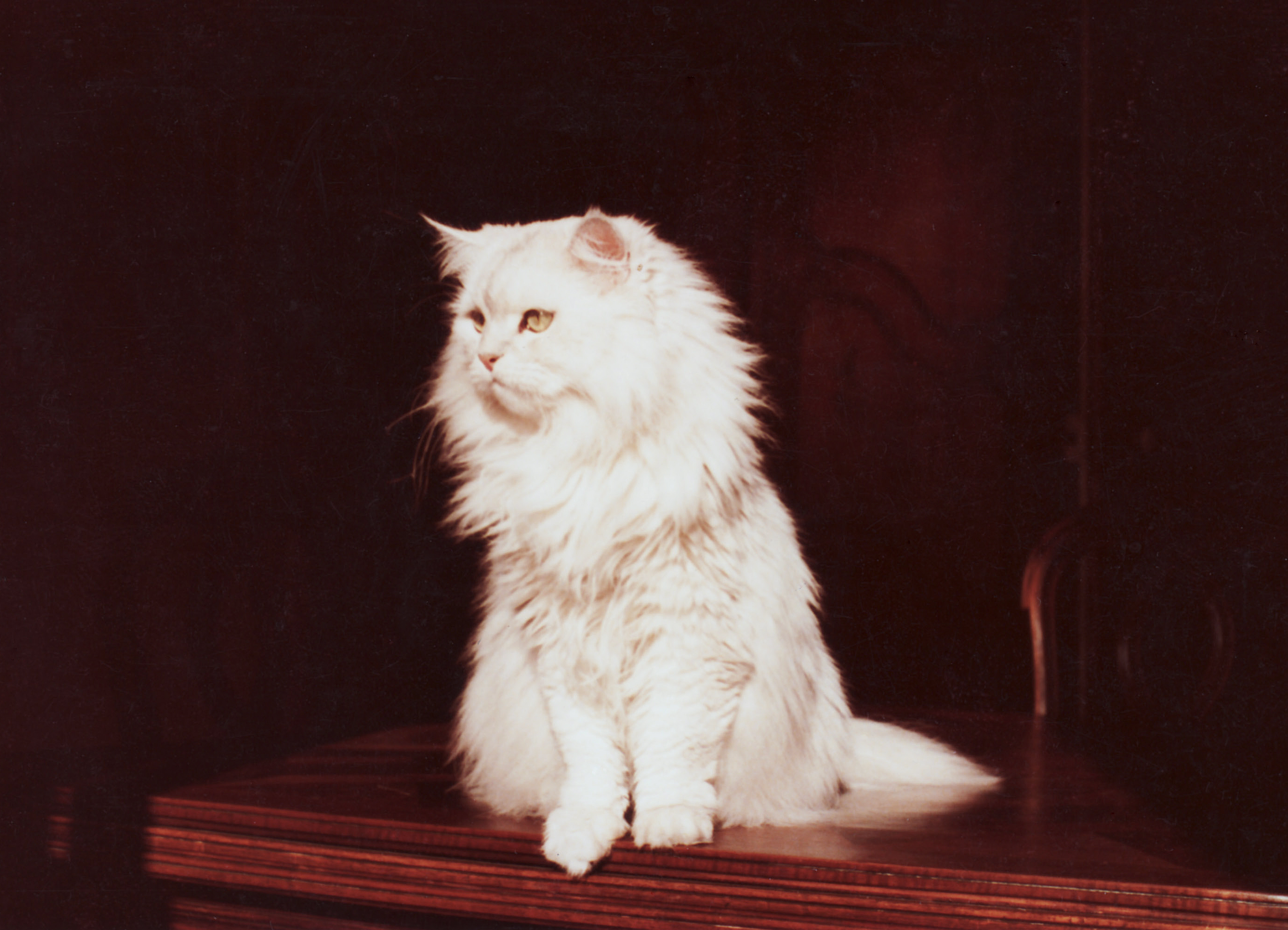 Chat persan chinchilla photographié à Strasbourg, avenue des Vosges, janvier 1980.